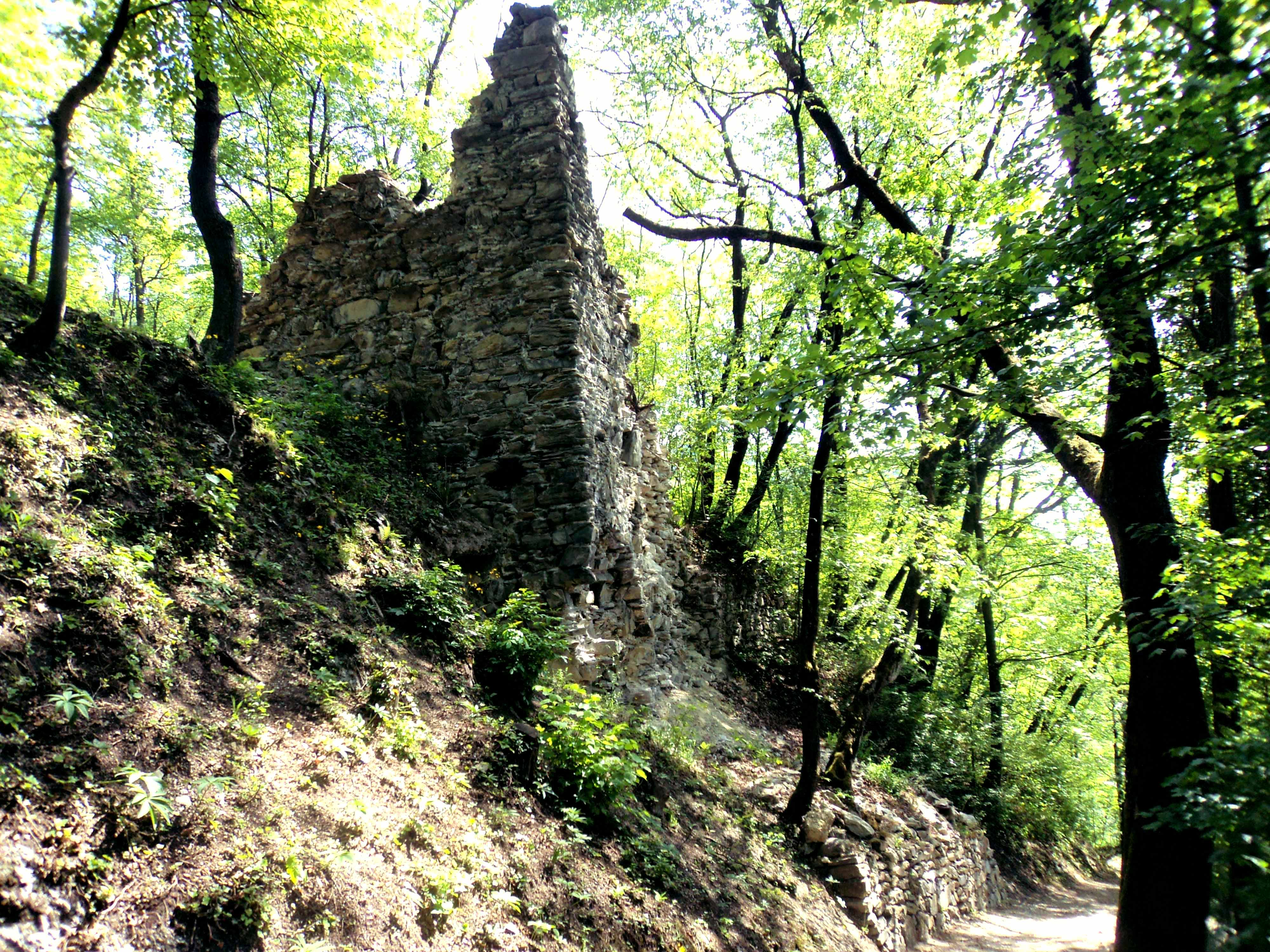 Ruševina gradu Radeče 2011